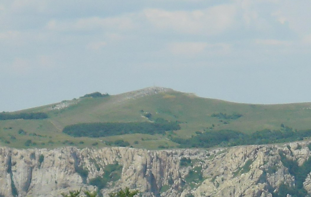 Фото